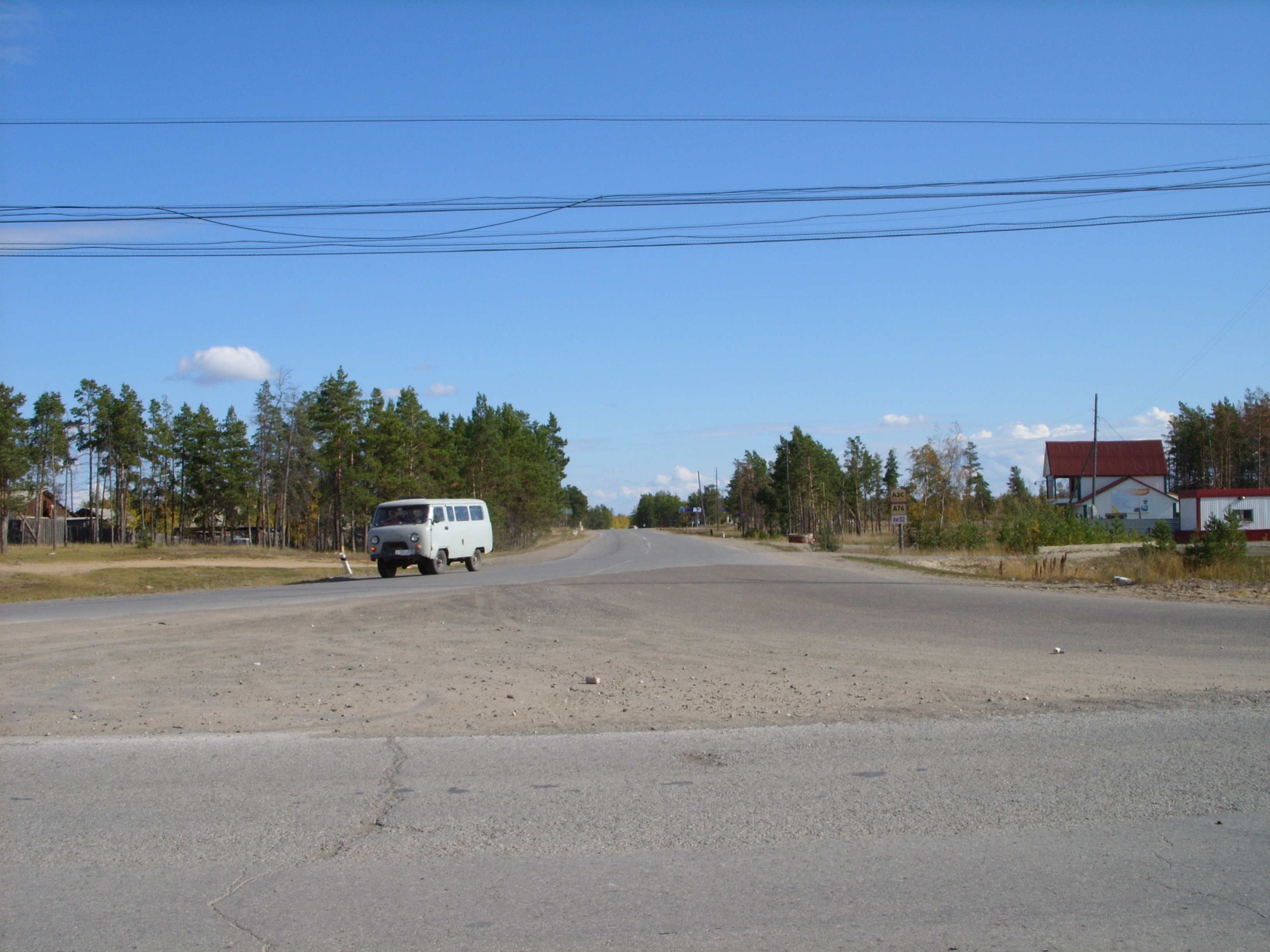 Перекресток. Налево - Магадан, направо - Большой Невер, прямо - Амга